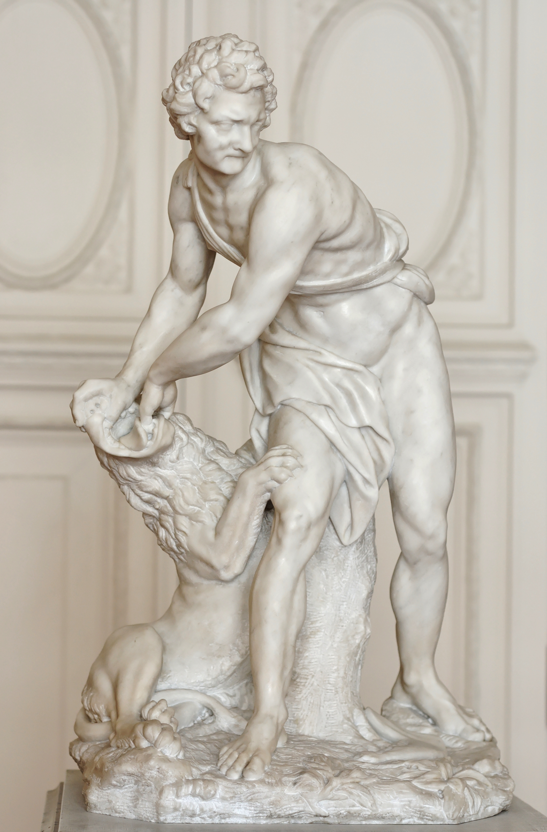 Samson and the lion. Marble, date unknown.